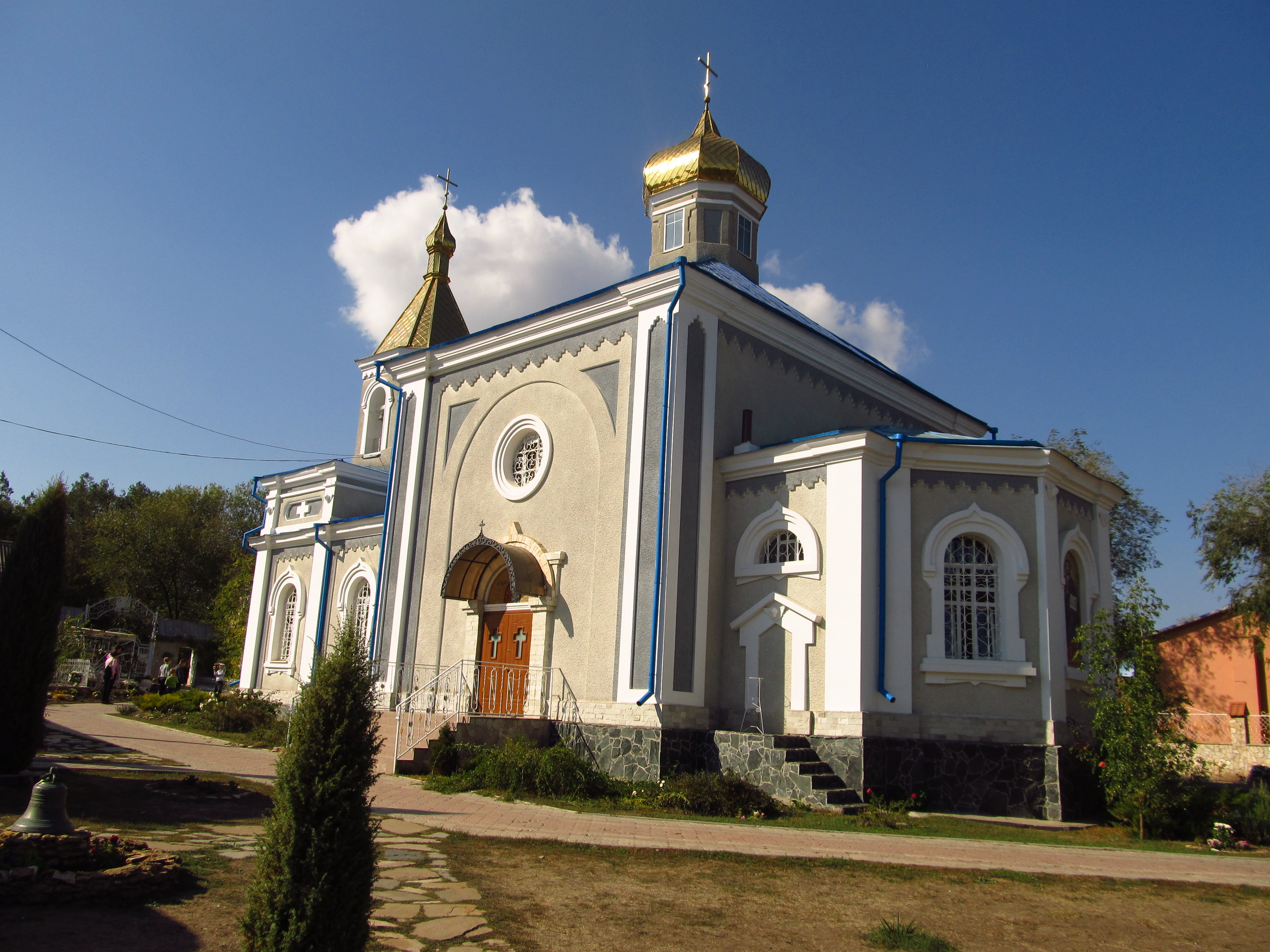 Церква Свято-Миколаївська, с. Кулевча